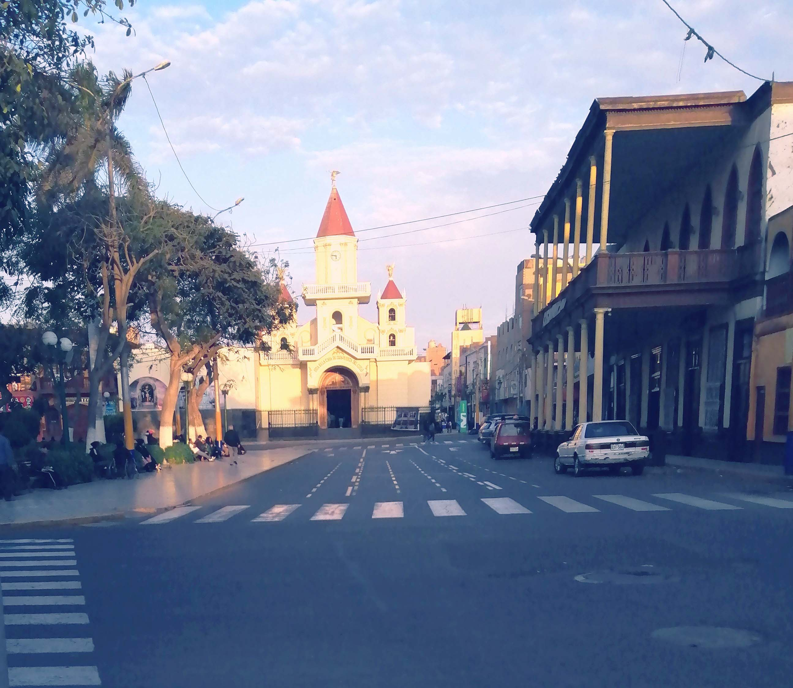 Perfil del Casino Huacho con la catedral de fondo en Huacho.